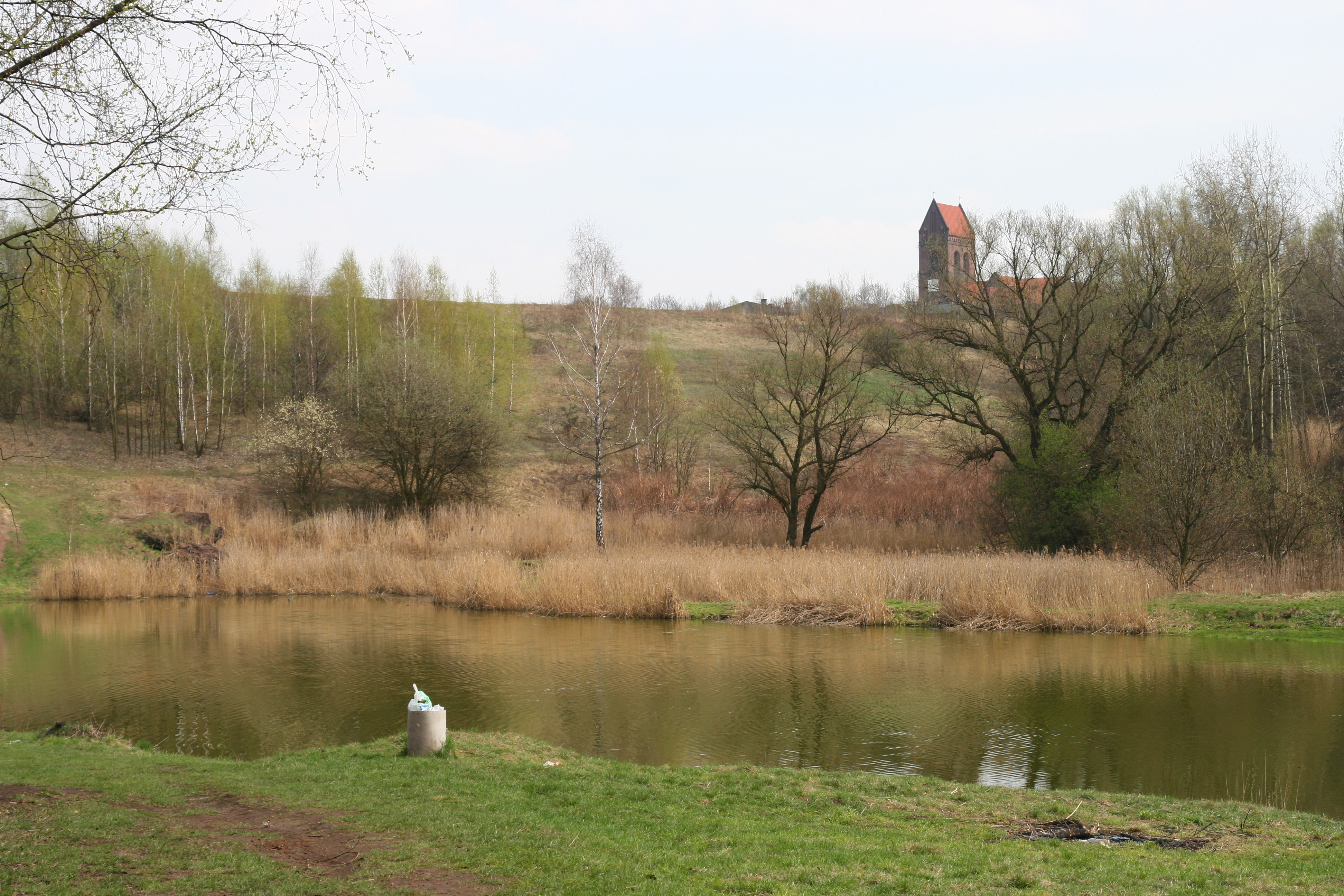 Staw Ajska na Chropaczowie w Świętochłowicach.